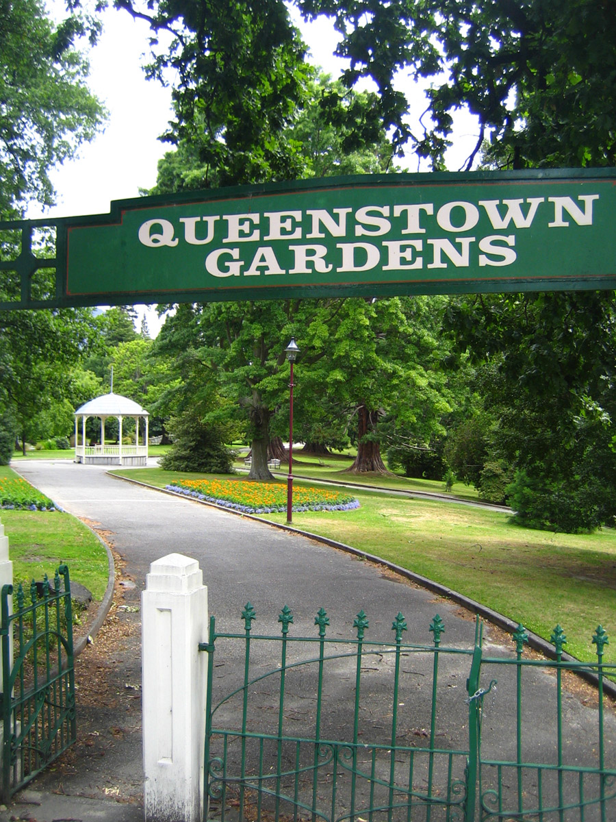 Photo jardin botanique de Queenstown